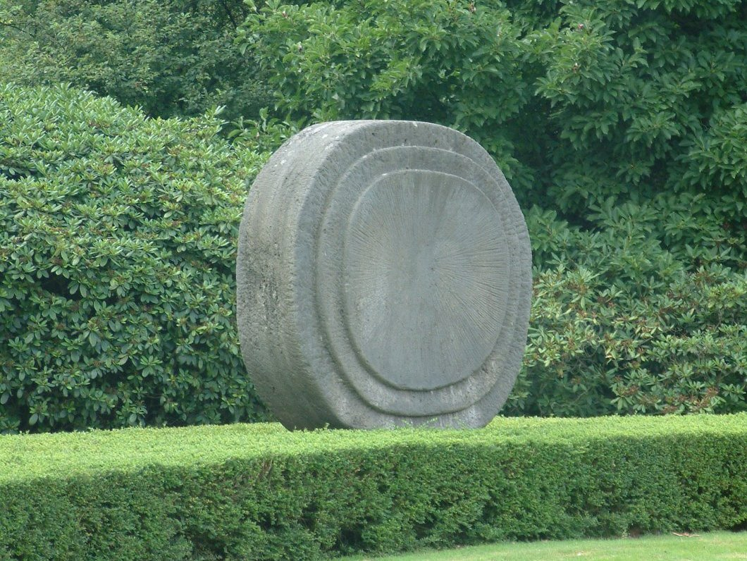 Zonneschijf, bij het Evoluon in Eindhoven. Een kunstwerk van Herbert Baumann.